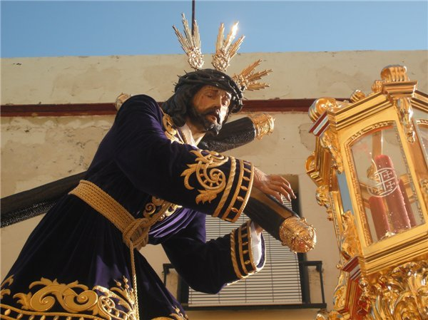 nuestro padre jesus en su nuevo paso